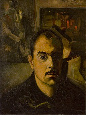 75x57 (óleo/tabla) 1965